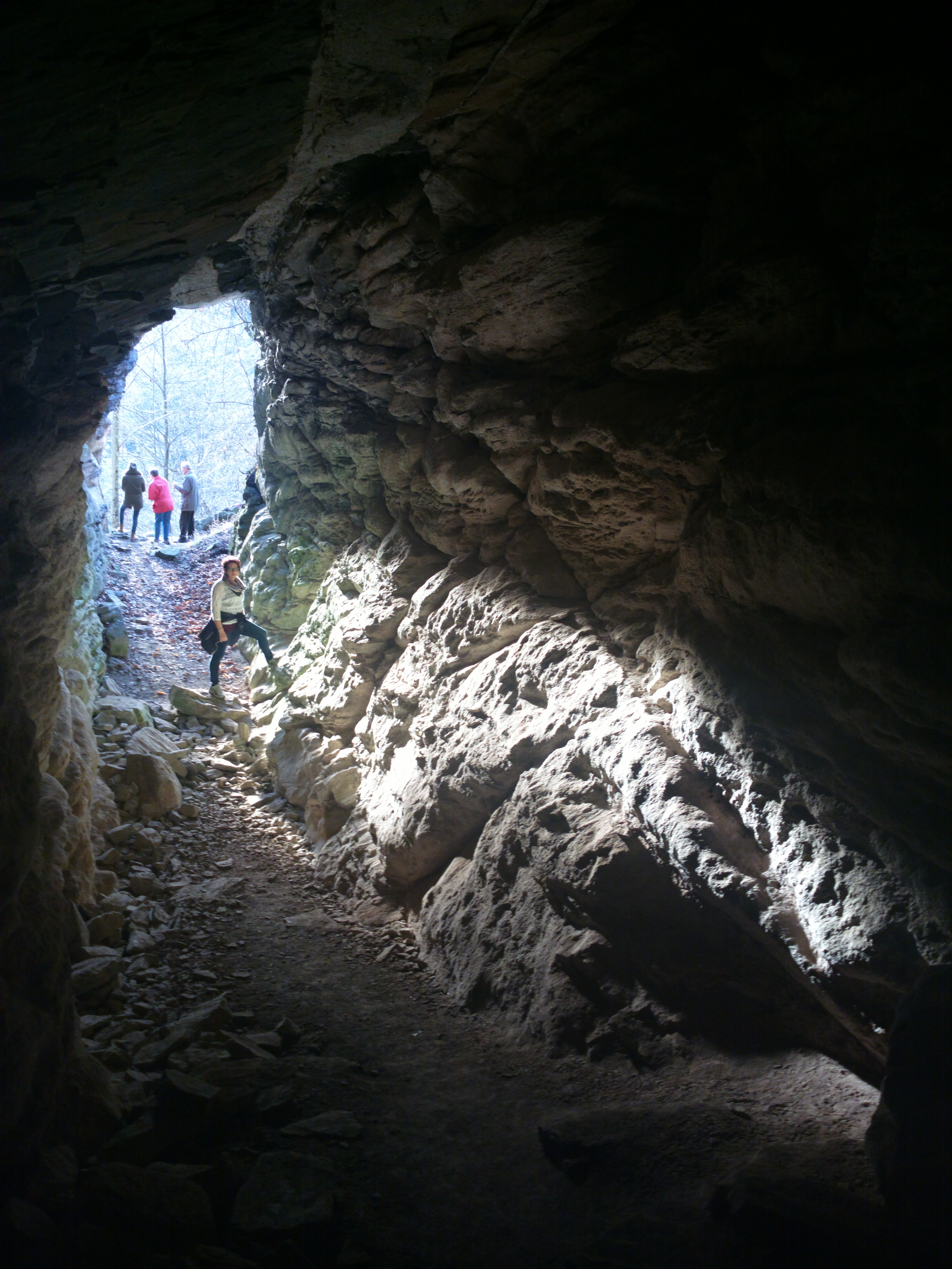 Eichmayerhöhle zur Wintersonnwende in Albrechtsberg an der Großen Krems